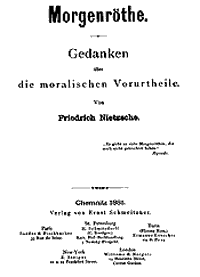 Portada de la primera edición